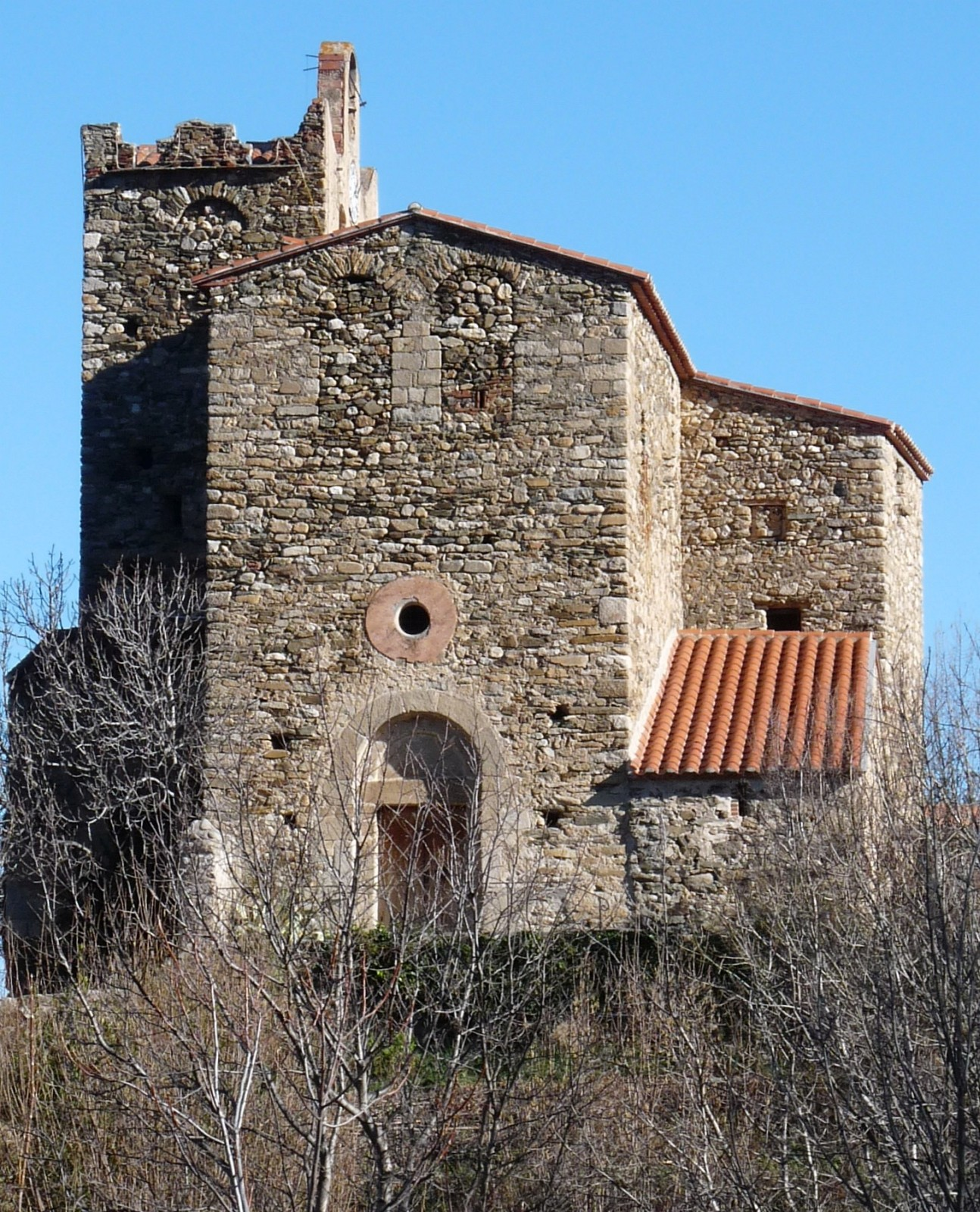 Eglise de Sirach, Ria-Sirach, Pyrénées-Orientales, France